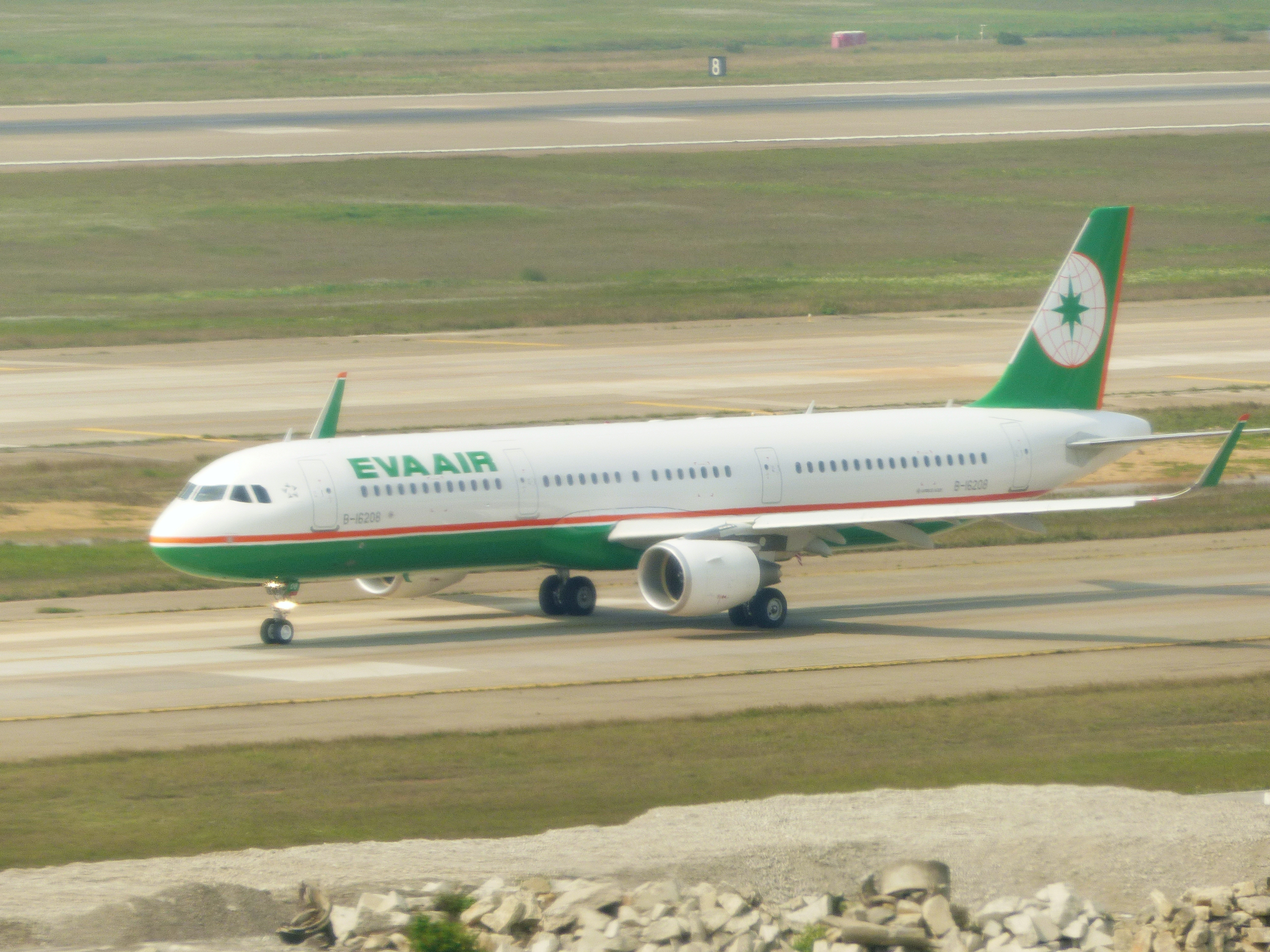 桃園國際機場北跑道南下移動的長榮航空空中巴士A321-211(WL) B-16208客機，攝於航科館瞭望塔。